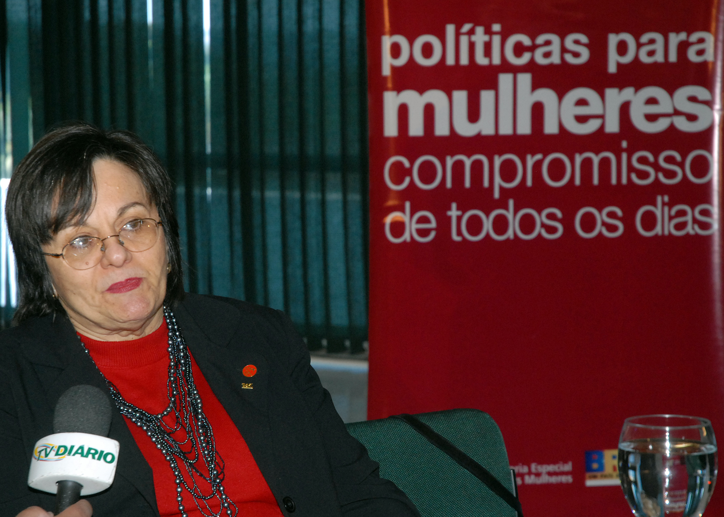 A farmacêutica Maria da Penha, que dá nome à lei contra a violência doméstica, participa de ato no Palácio do Planalto em comemoração aos dois anos da lei